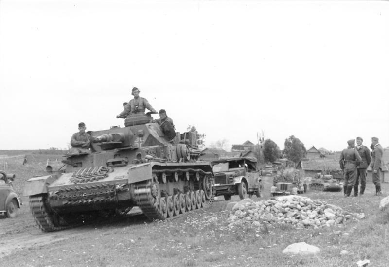 Information added by Wikimedia users.Беларуская (тарашкевіца): Чавусы (Čavusy), вуліца Барадзініцкая (vulica Baradzinickaja). Нямецкія войскі